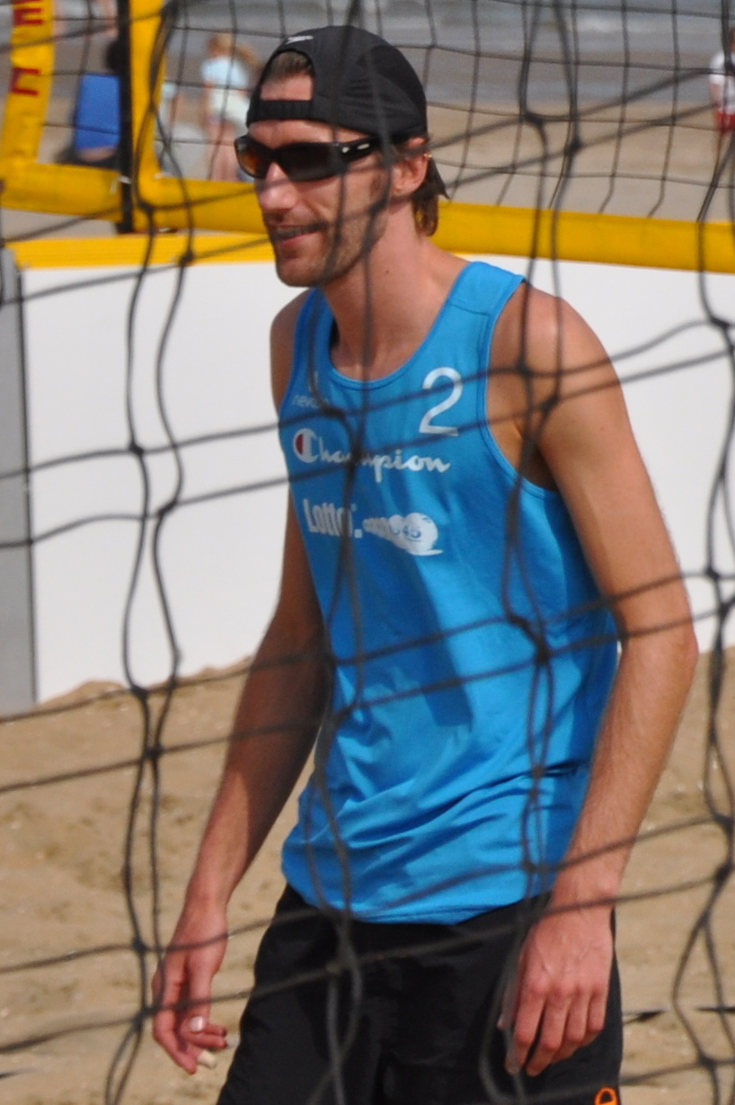 Emiel Nicolaas Paulus (Emiel) Boersma (Amsterdam, 25 augustus 1980) is een Nederlandse beachvolleybalspeler.